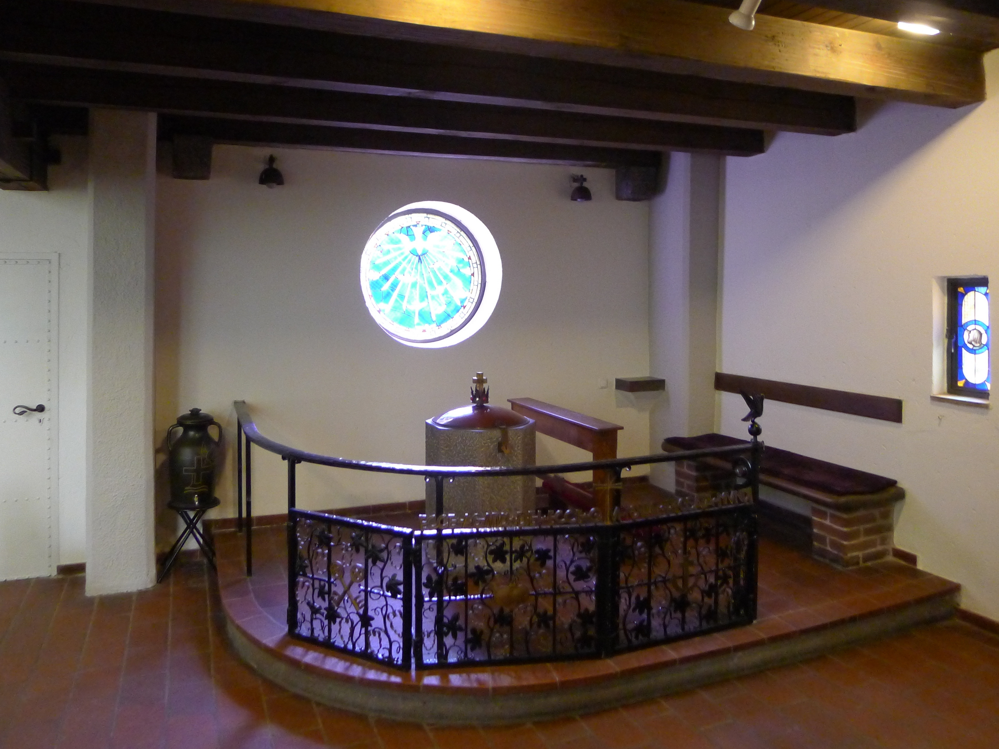 Taufkapelle unter der Empore